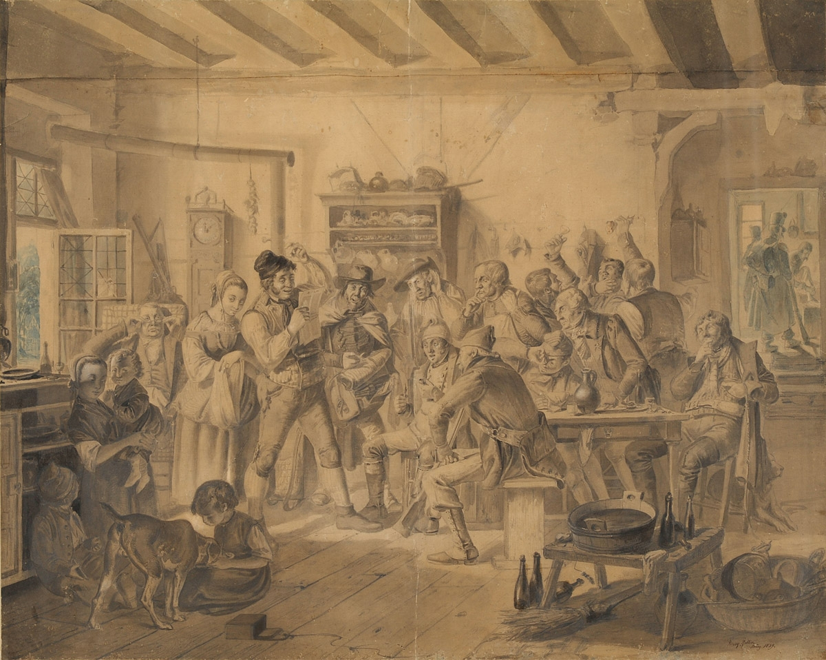 Verkündigung eines preußischen Sieges, Zeit der Befreiungskriege.